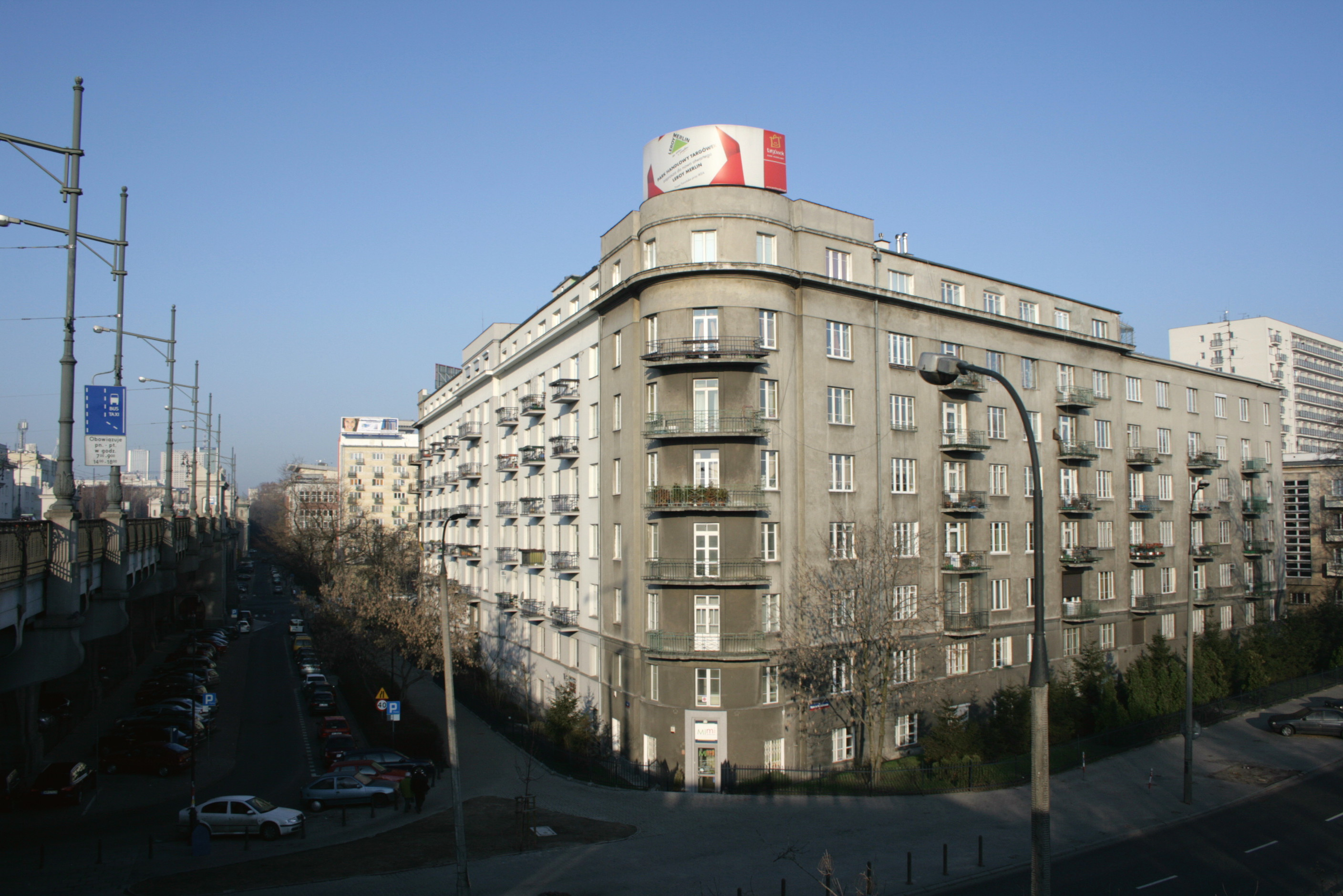 budynek przy Alei 3 Maja 2 w Warszawie od strony południowo-wschodniej widziany z wiaduktu Mostu Poniatowskiego